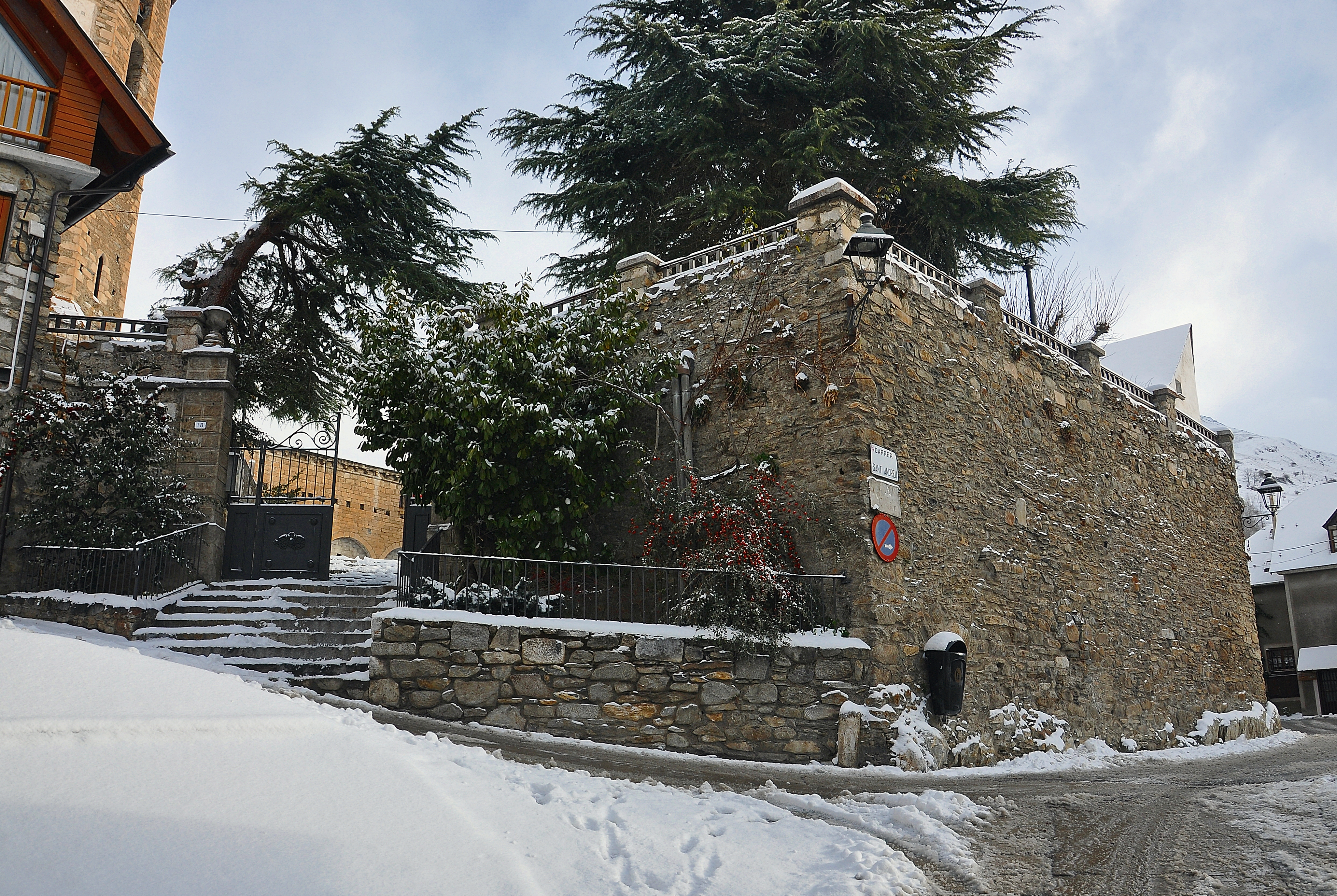 Valle de Aran-2016